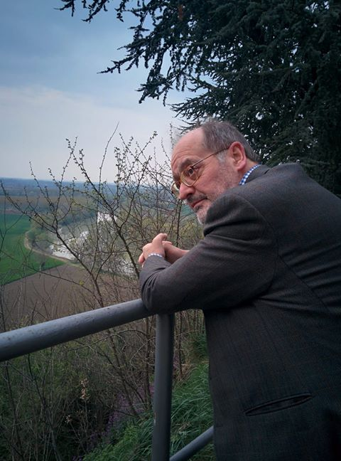 Vittore Fossati presso il fiume Tanaro a Masio (AL), nel 2019.